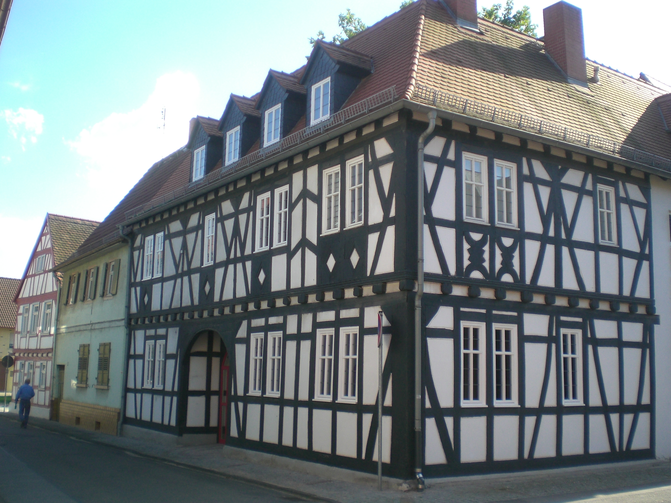 trabfaka domo Stadthausstr. 15 en Gernsheim, Hesio